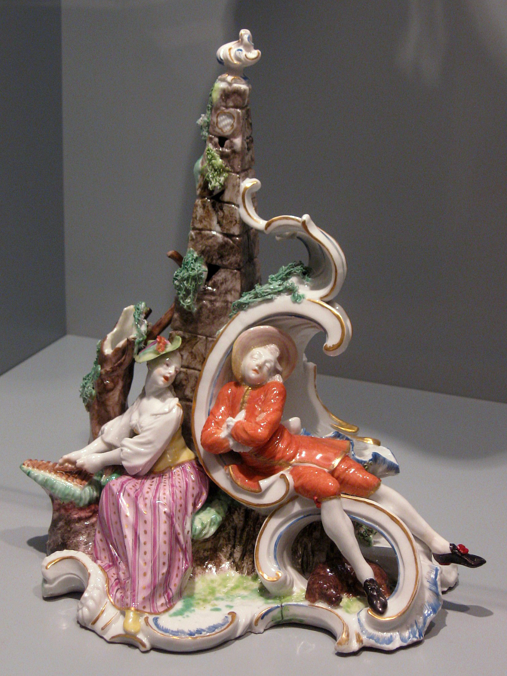 Franz Anton Bustelli: Liebesgruppe "Der gestörte Schläfer", um 1756, Porzellanmanufaktur Nymphenburg, Bayerisches Nationalmuseum in München